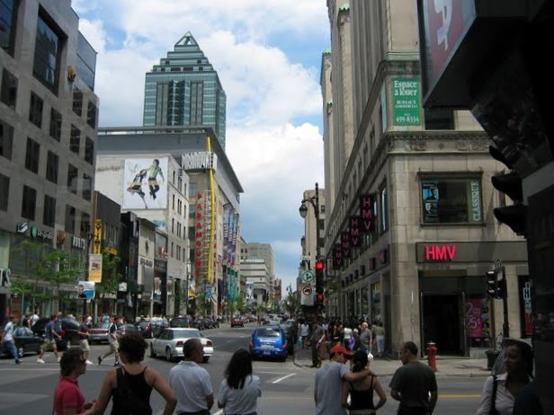 Улица Св.Катерины (Монреаль)